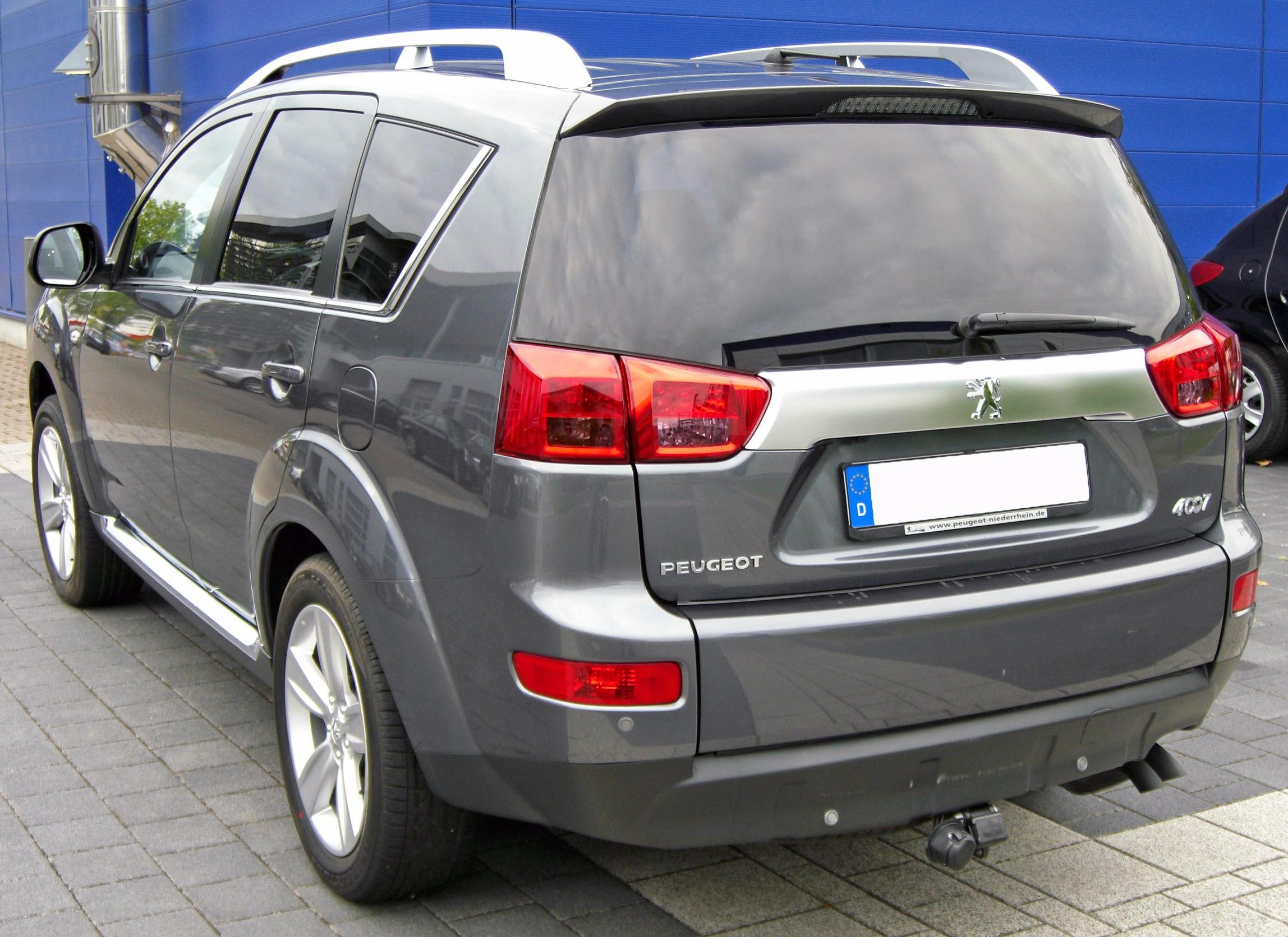 Peugeot 4007